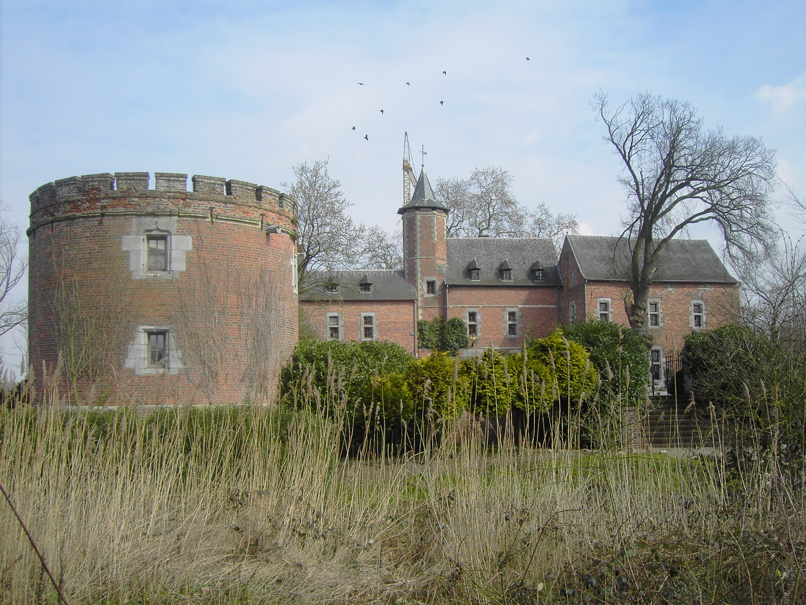 Een foto van de commanderij van Gruitrode vanuit zuid-oostelijke richting gezien.